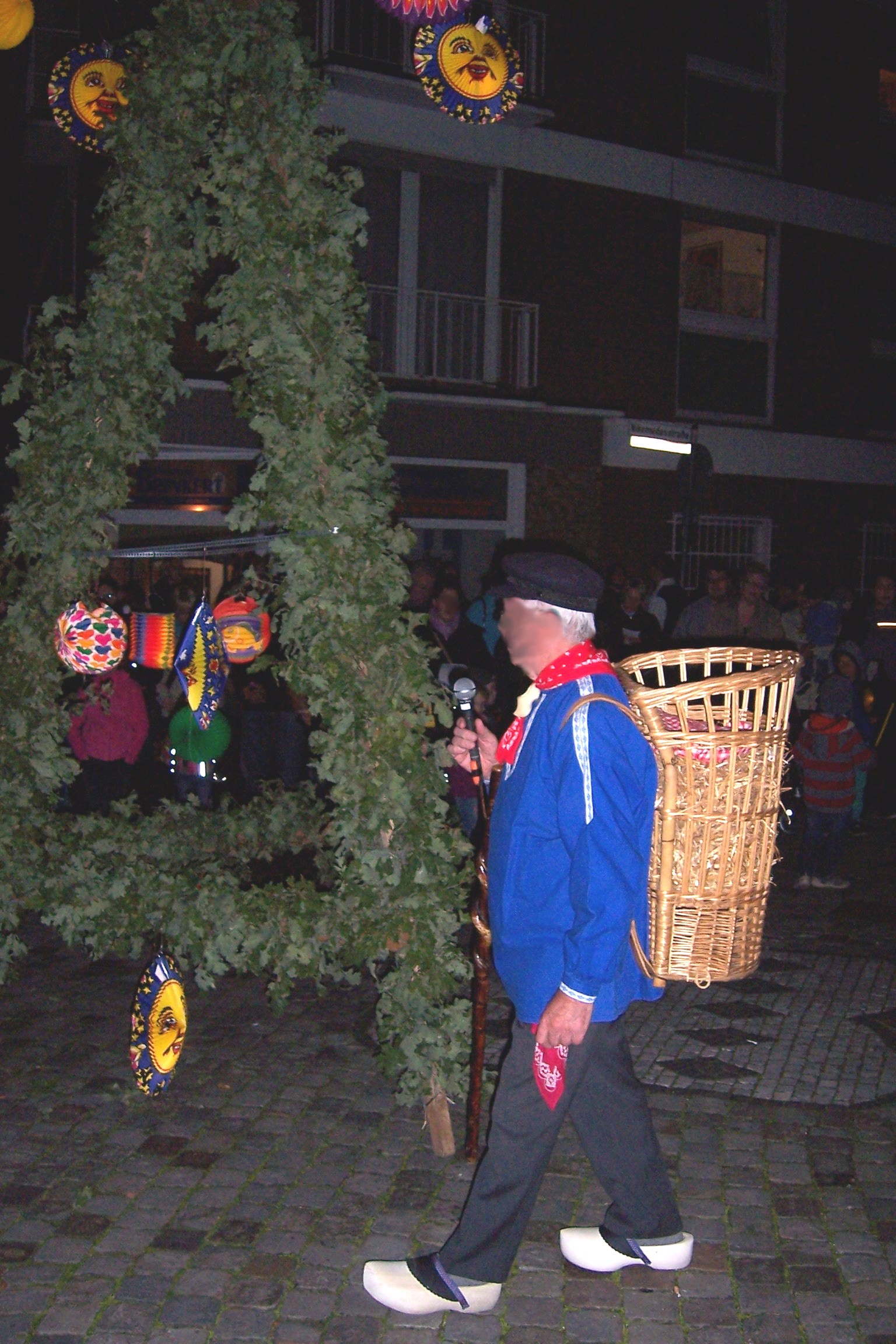 Lambertuspyramide Steinfurt-Borghorst, NRW, Germany mit "Bauer/Kiepenkerl" für das niederdeutsche Singspiel "Oh Buer wat kost´ dien Hei? (Wieviel kostet dein Heu?)".